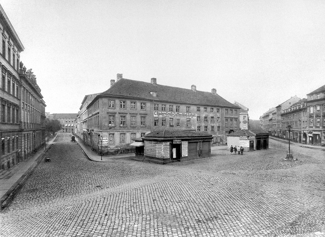 Hackescher Markt, Berlin (links Neue Promenade, rechts Oranienburger Straße)